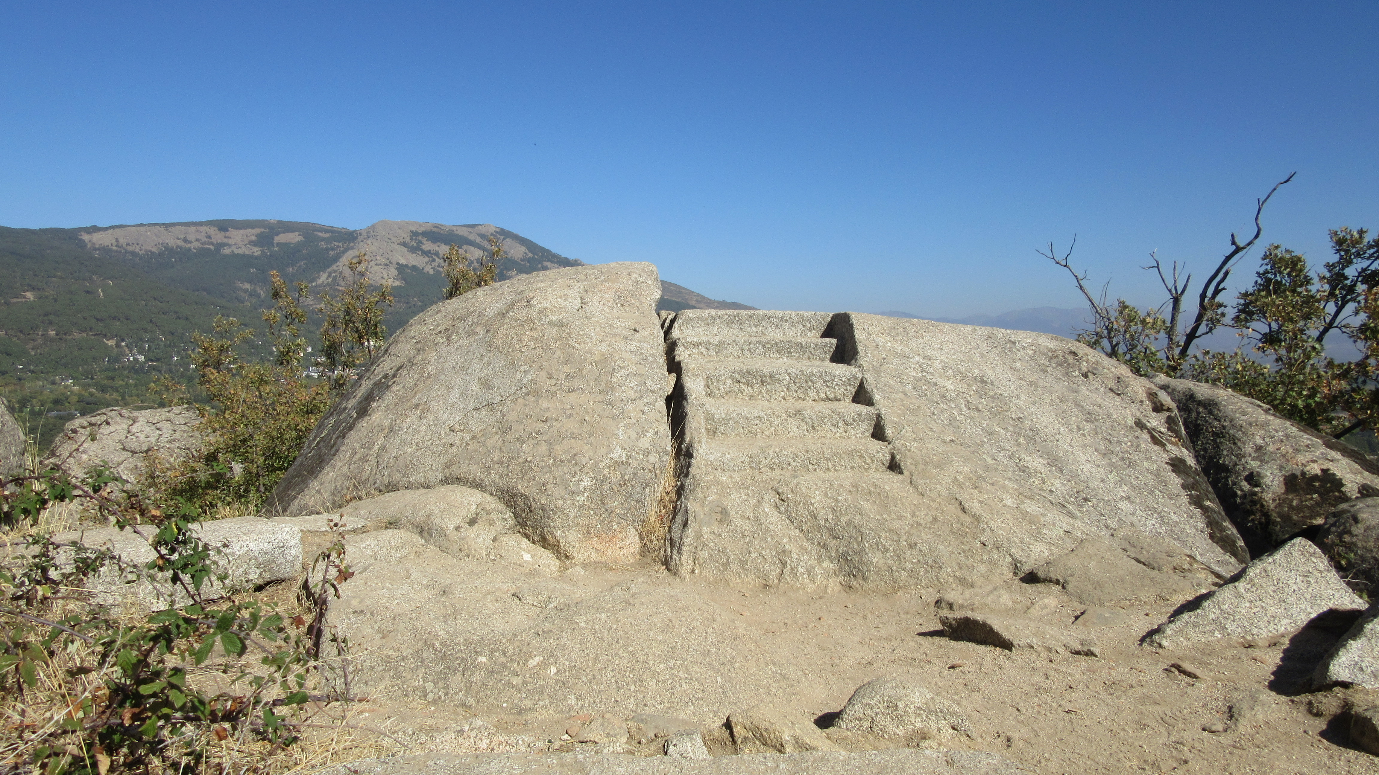 Németon celta al norte de la Silla de Felipe II.